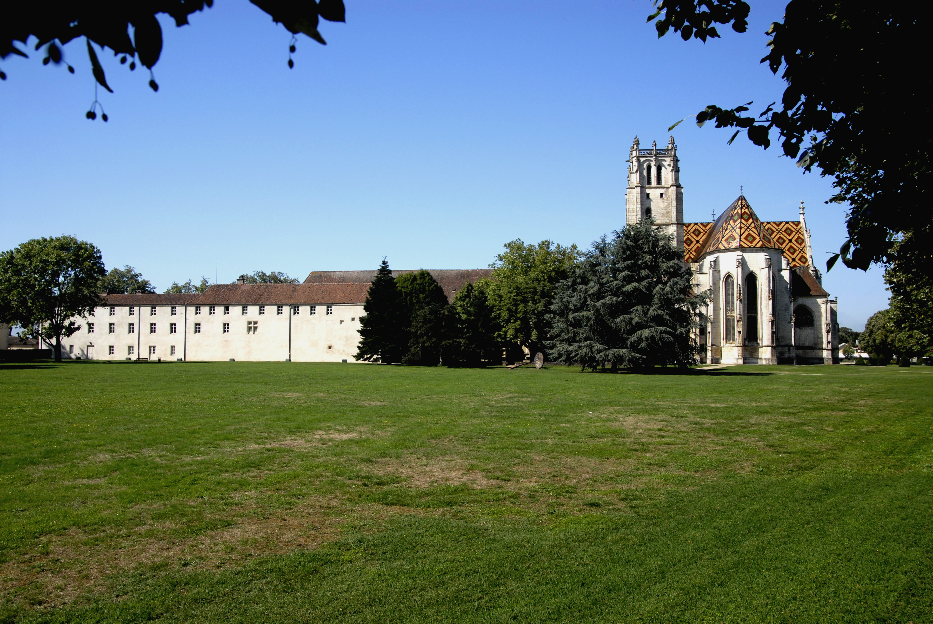 Abtei Brou, Ansicht von Osten